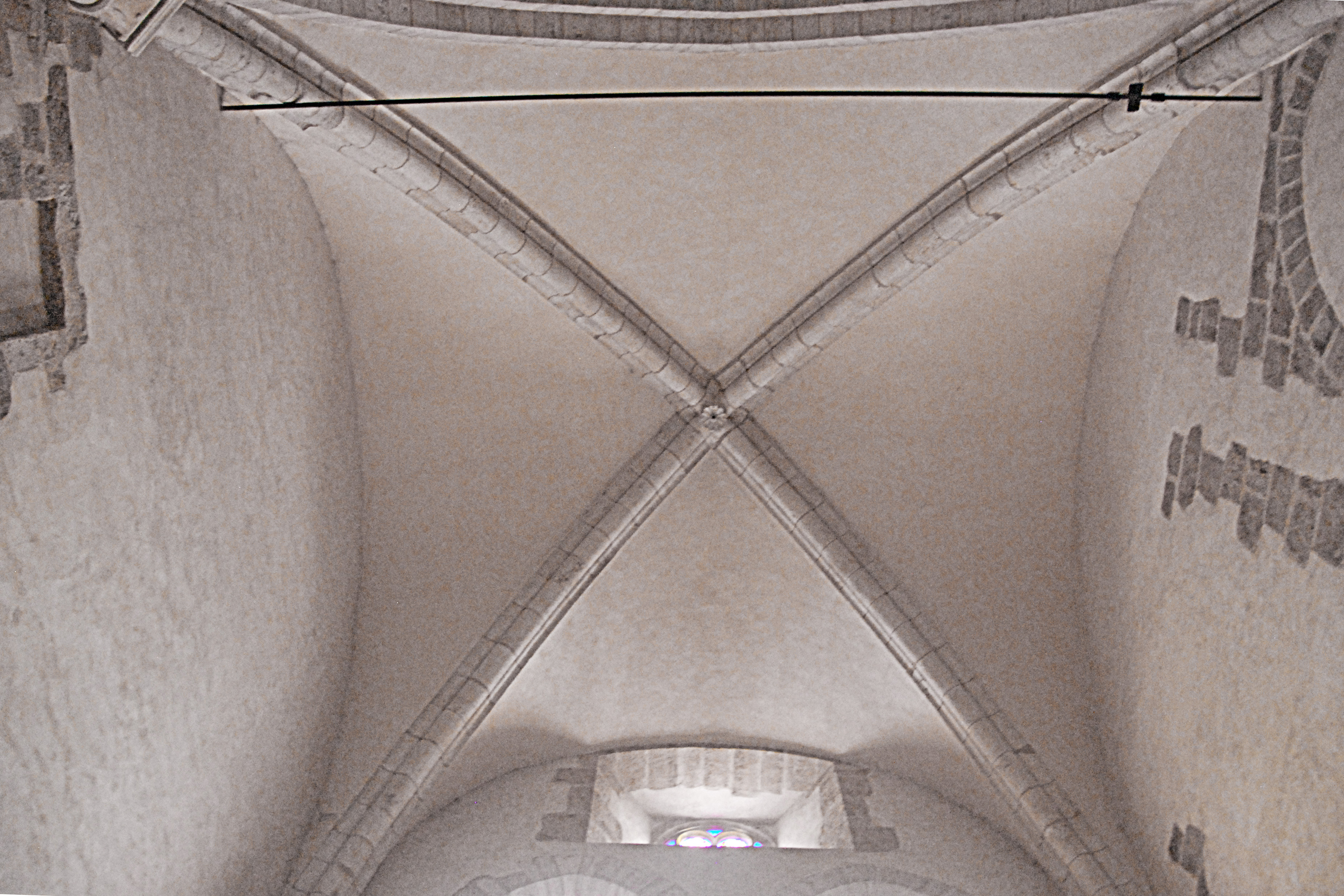 Neuvy_St.-Sépulcre, Basilika, Mittelschiff, Gewölbe Chorjoch